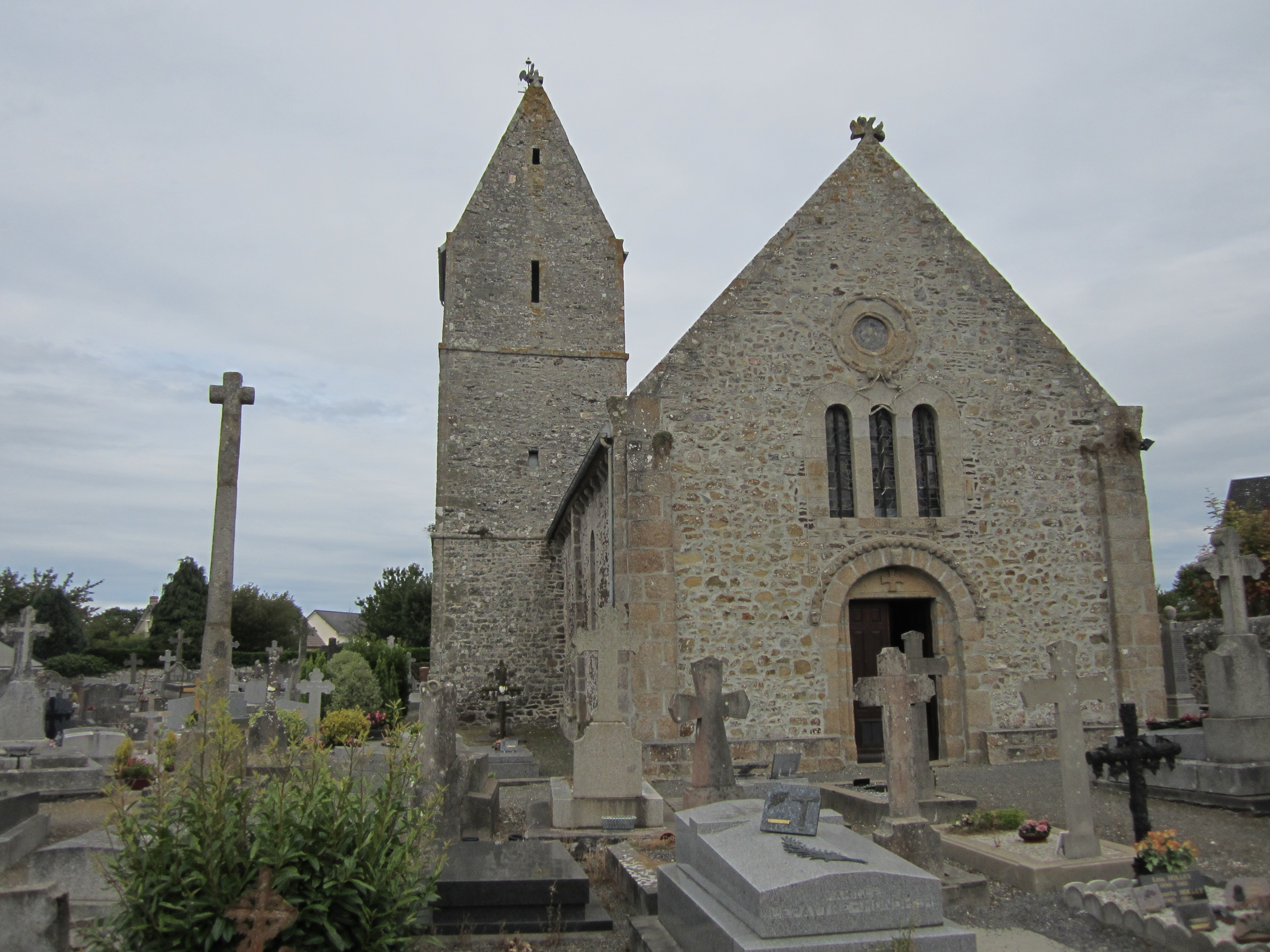 Yquelon, Manche